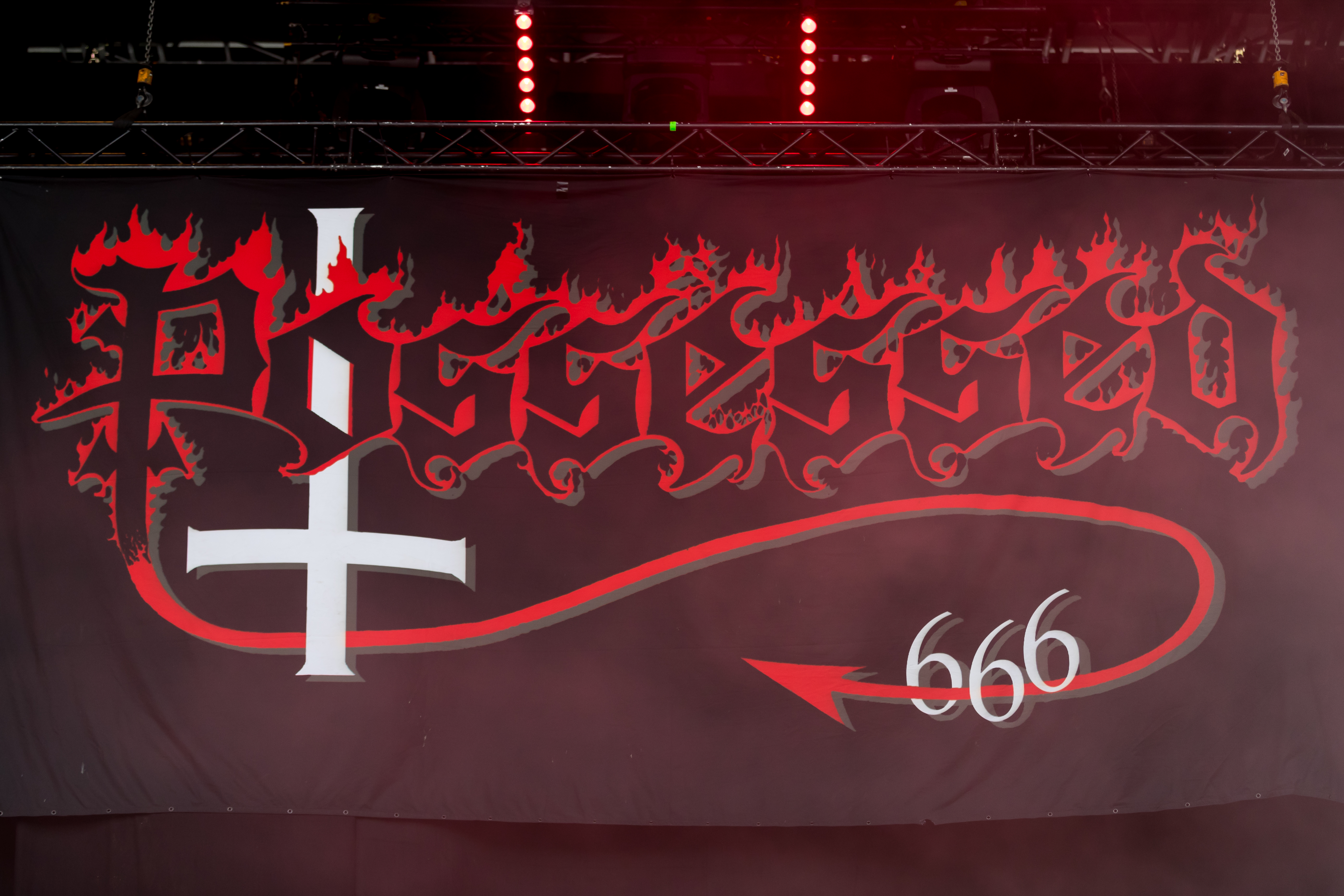 Possessed during Wacken Open Air at Schleswig-Holstein, Wacken, , Germany on 2017-08-05, Photo: Sven Mandel